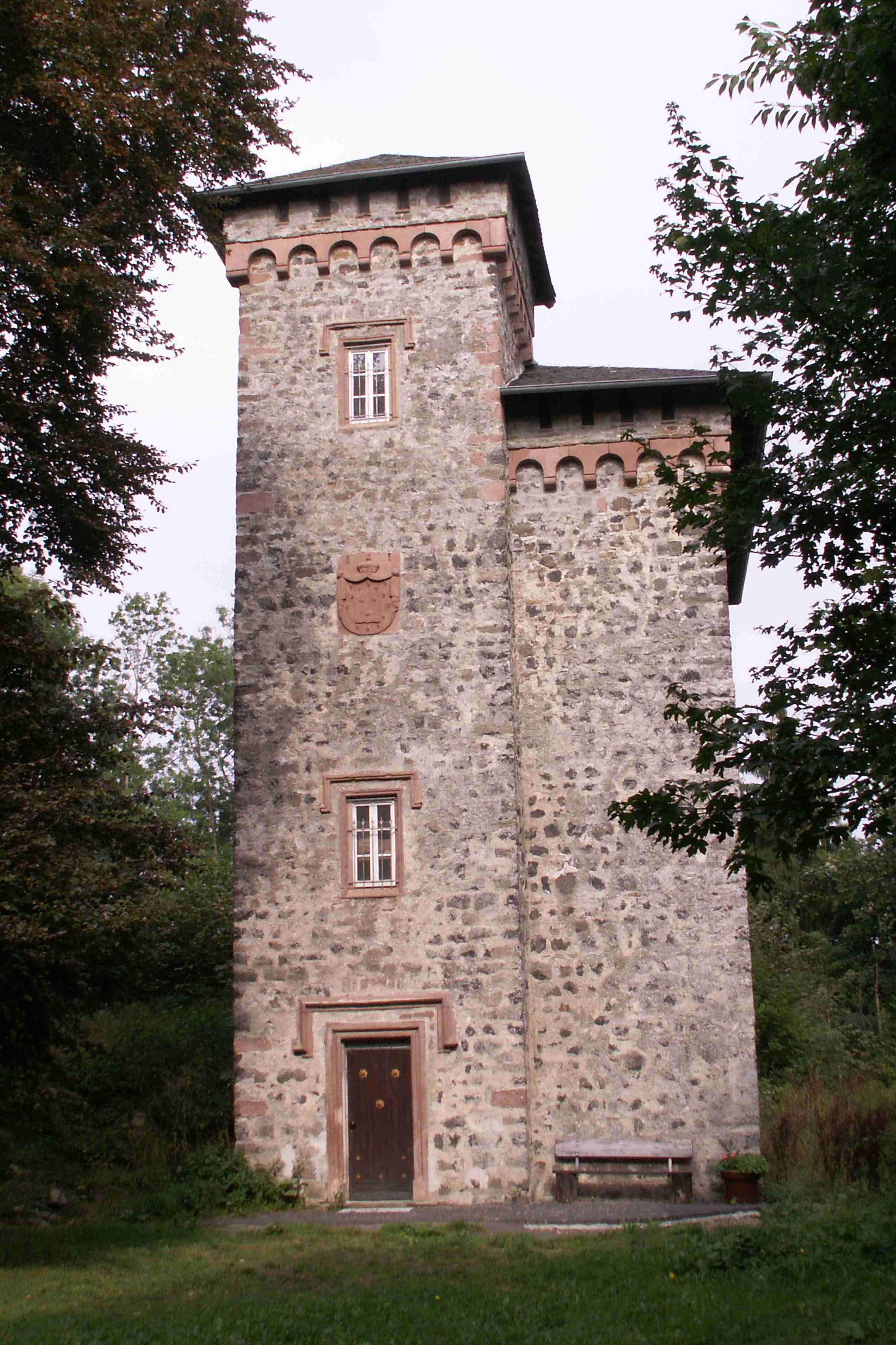 Aussichtsturm auf dem Gelände der Ruine Schloss Aremberg aus Steinen der ehemaligen Burganlage